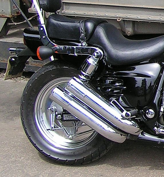 Schijfwiel